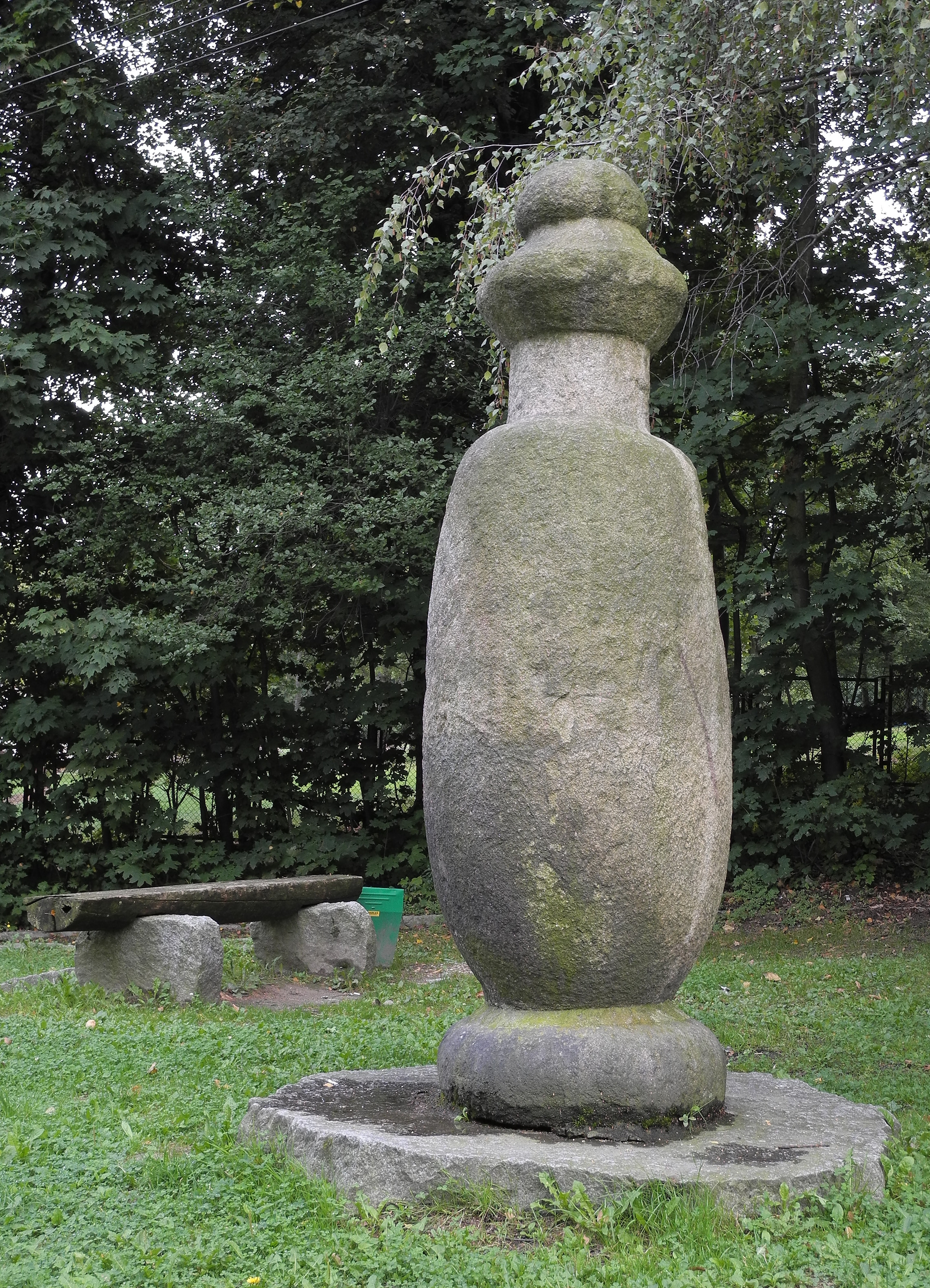 Starożytna rzeźba "Mnich" przy drodze z Sobótki do Domu Turysty PTTK pod Wieżycą